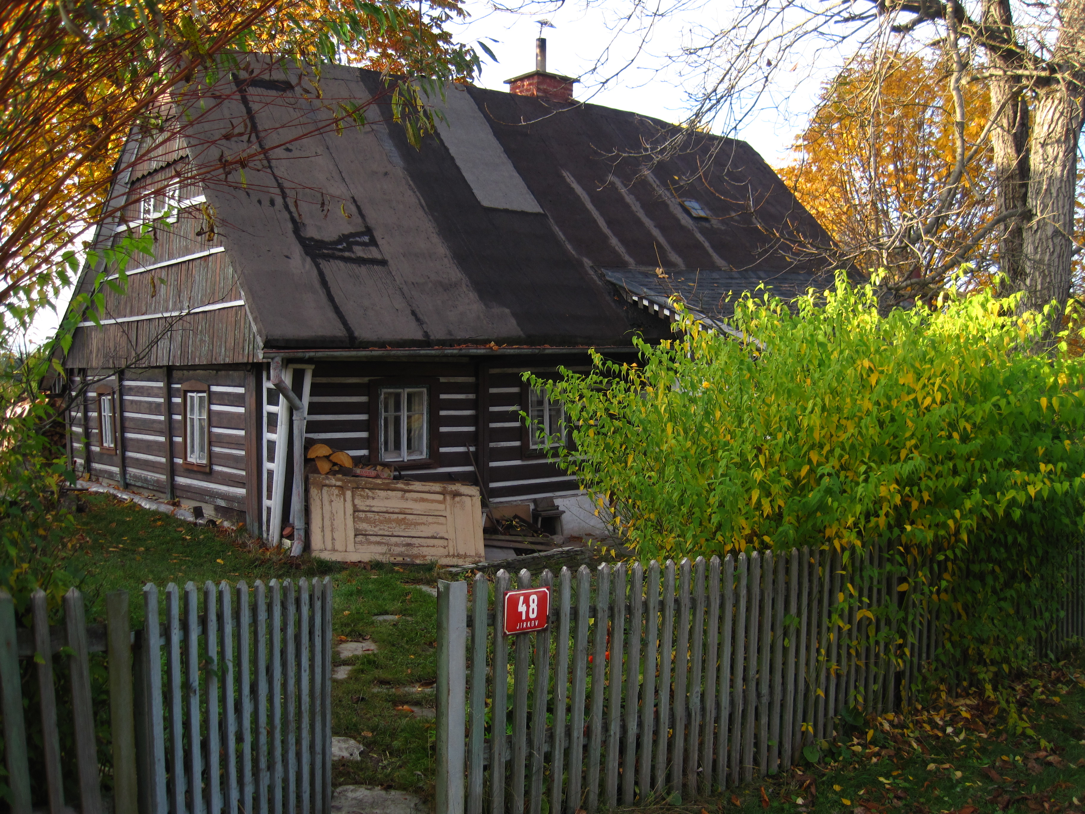 Jirkov (u Železného Brodu) - chalupa čp. 48